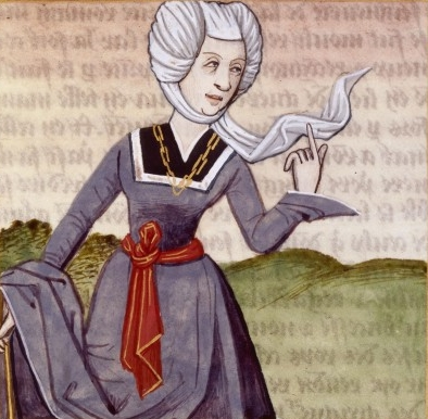 Julia Soaemias (v. 180-222 ap. J.C.), impératrice romaine.